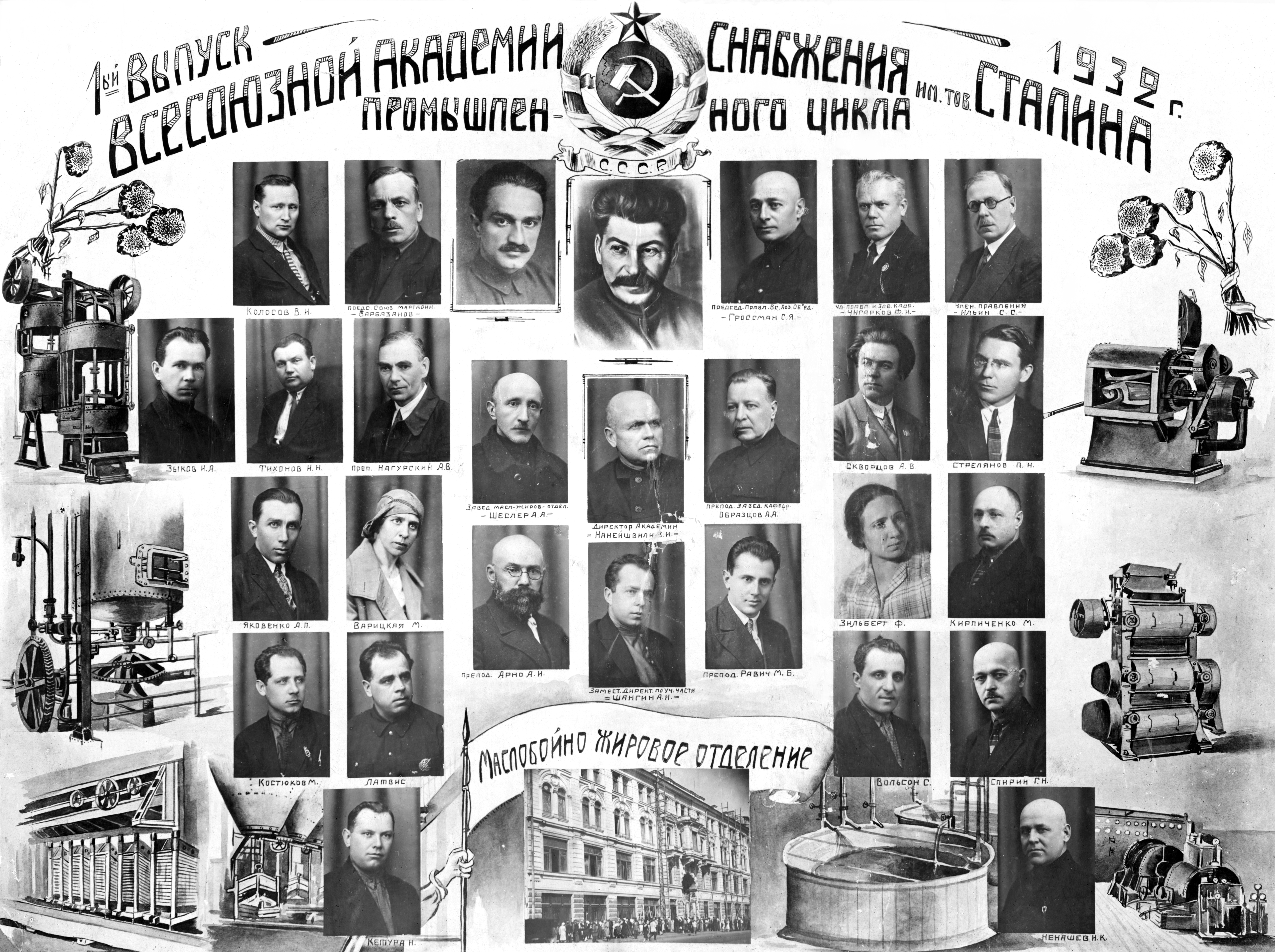 Ильин, Семён Савельевич и его коллеги